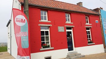 Maison